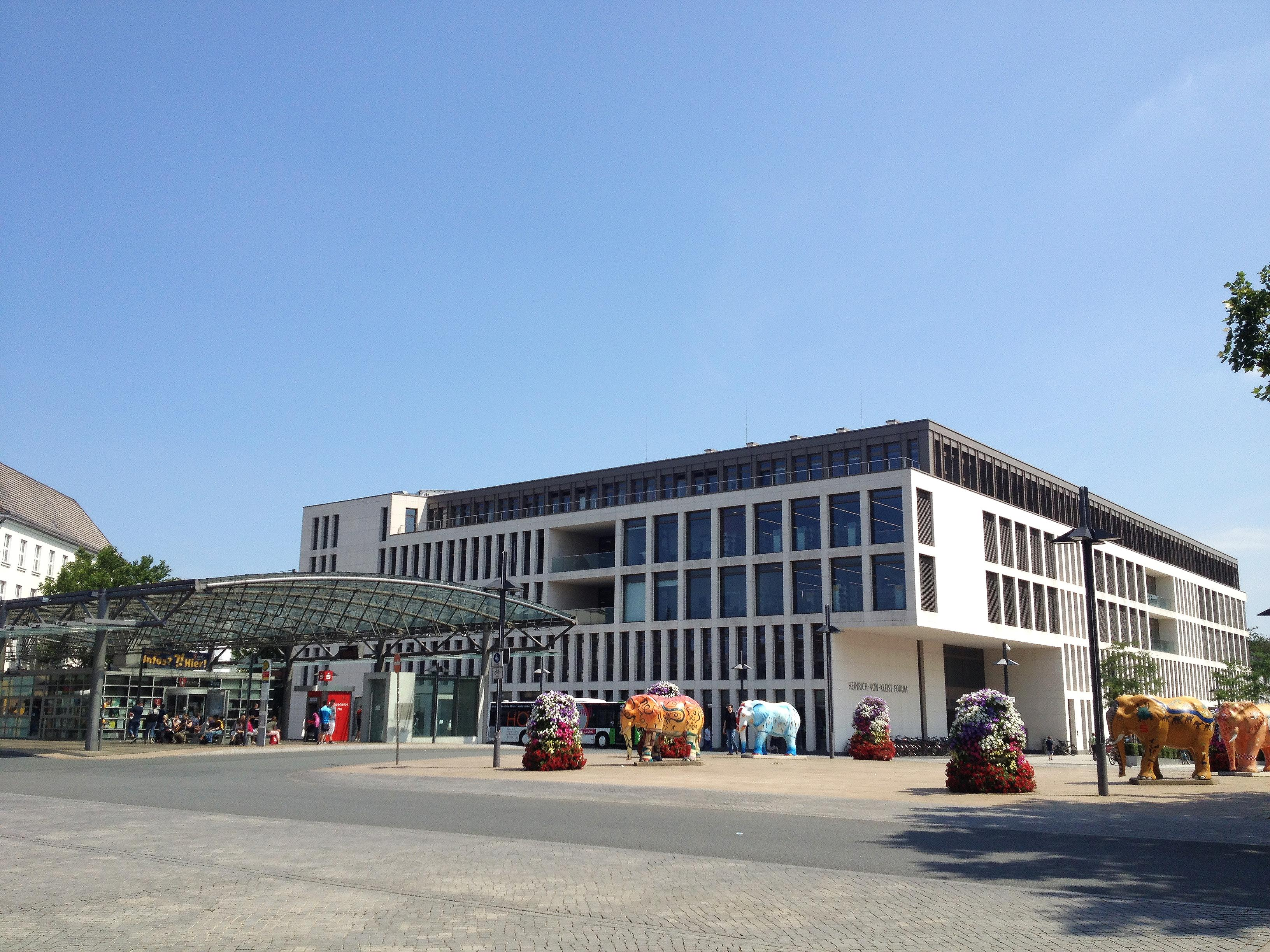 Platz der Deutschen Einheit am Bahnhof mit Heinrich-von-Kleist-Forum in Hamm (Westf.)